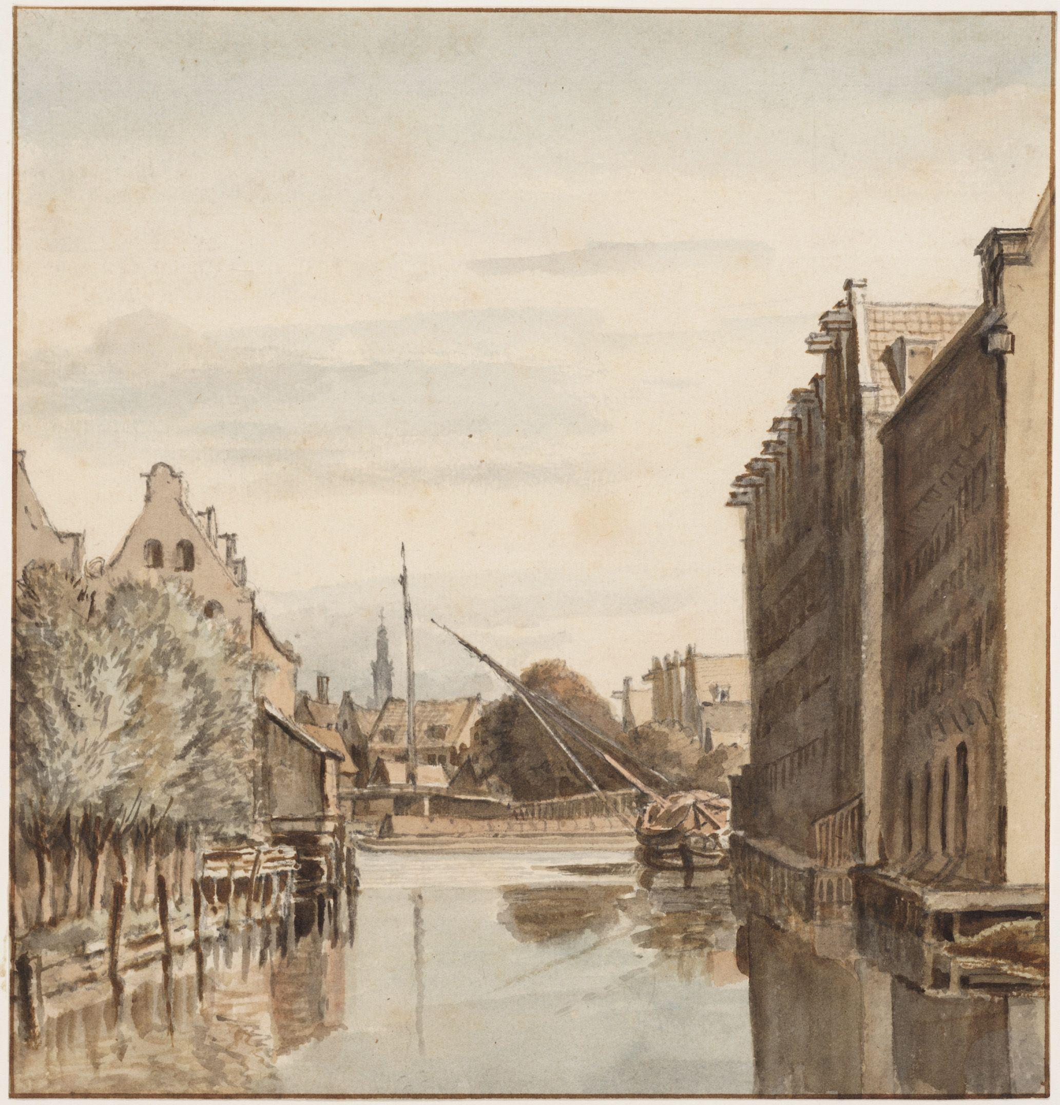 Beschrijving Smallepadsgracht Documenttype tekening Vervaardiger Lamberts, Gerrit Collectie Collectie Koninklijk Oudheidkundig Genootschap Datering 1818 Geografische naam Smallepadsgracht Inventarissen Afbeeldingsbestand KOG-AA-2-19-361